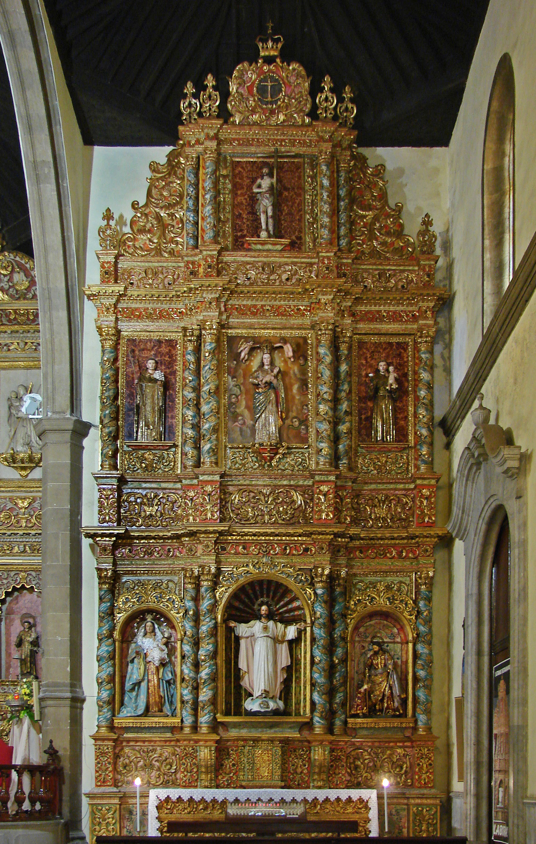 Altar-Retabel der „Mareantes“ in der Kirche Nuestra Señora de la Peña de Francia in Puerto de la Cruz